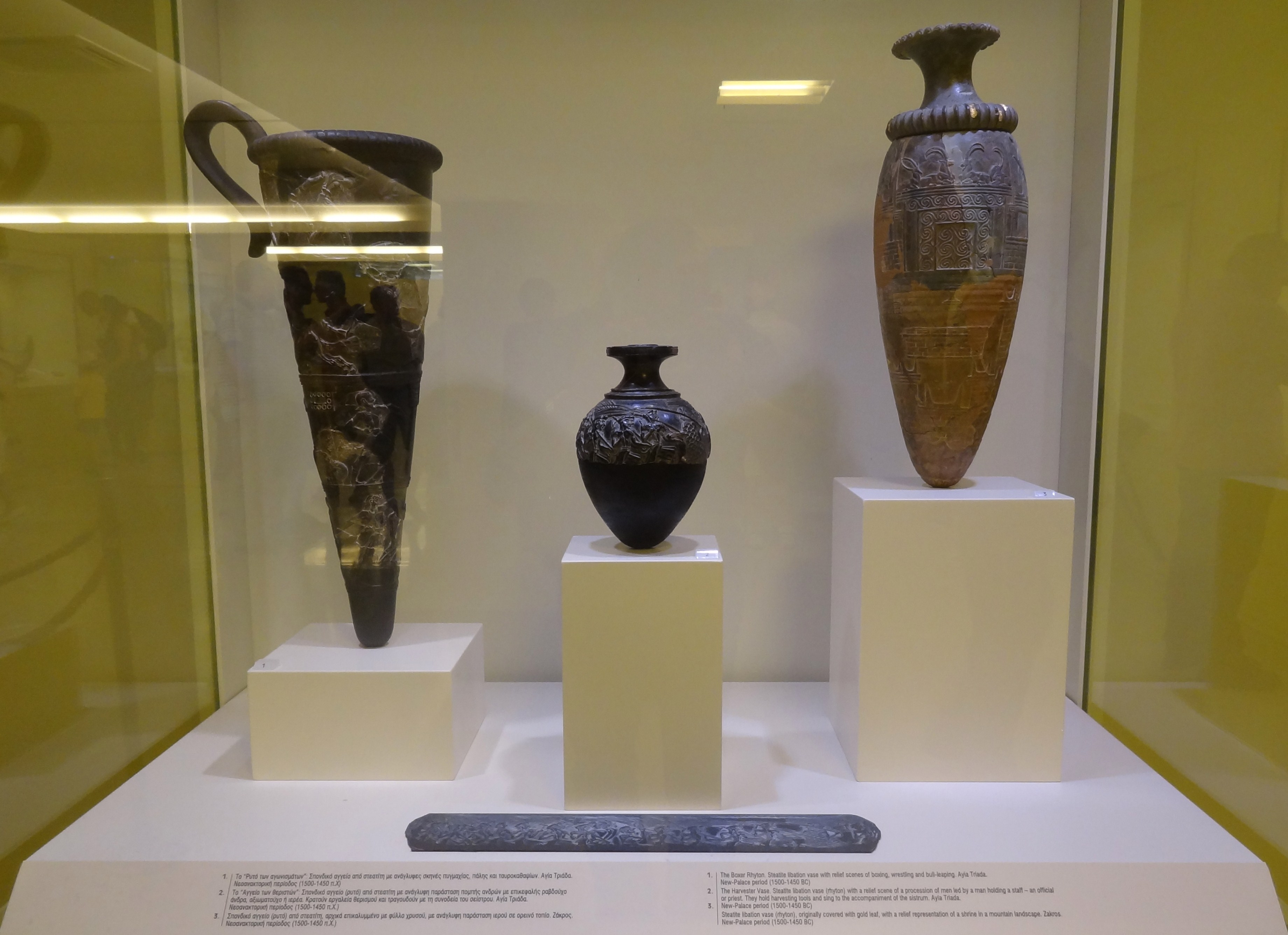 „Boxerrhyton“, „Schnittervase“ und Rhyton mit Darstellung eines Gipfelheiligtums (Neupalastzeit 1500–1450 v. Chr.) aus Agia Triada und Kato Zakros, ausgestellt im Archäologischen Museum Iraklio, Kreta, Griechenland